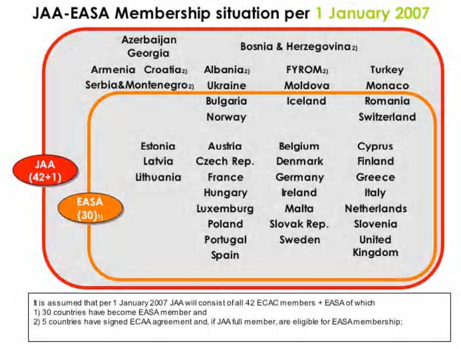 EASA diagramm